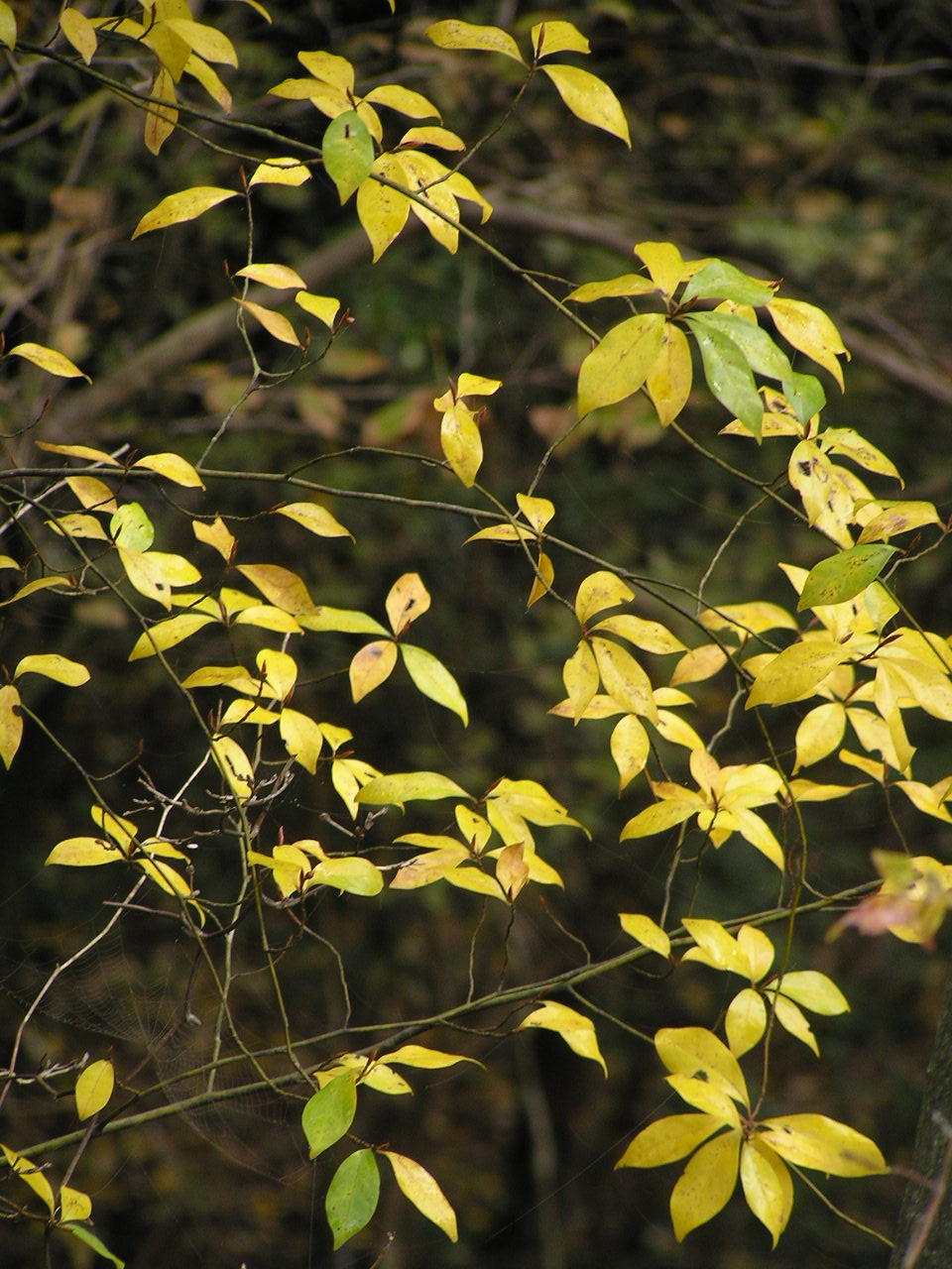 クロモジ（黒文字、Lindera umbellata）はクスノキ科の落葉低木。枝を高級楊枝の材料とし、楊枝自体も黒文字と呼ばれる。また香料の黒文字油がとれる。